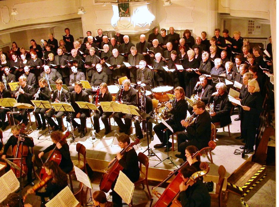 Brahms-Aufführung -M.Lotzmann